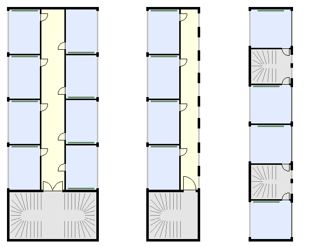 Schema von drei Schul-Bauformen, von links nach rechts: Kasernen-Typ Gangtyp Schustertyp: Hauptfensterwand links, Nebenfensterwand rechts blau: Klassenräume, grün: Wandtafel, gelb: horizontale Erschließung durch Flure, grau: vertikale Erschließung durch Treppenhäuser